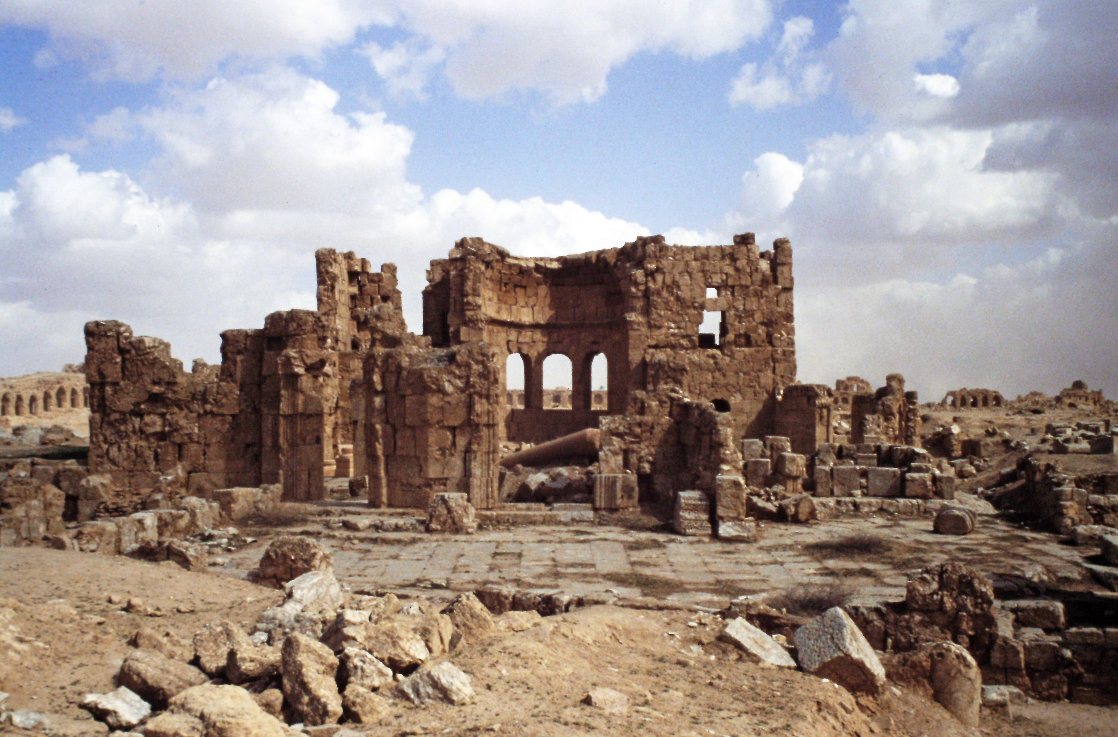 Martyrion